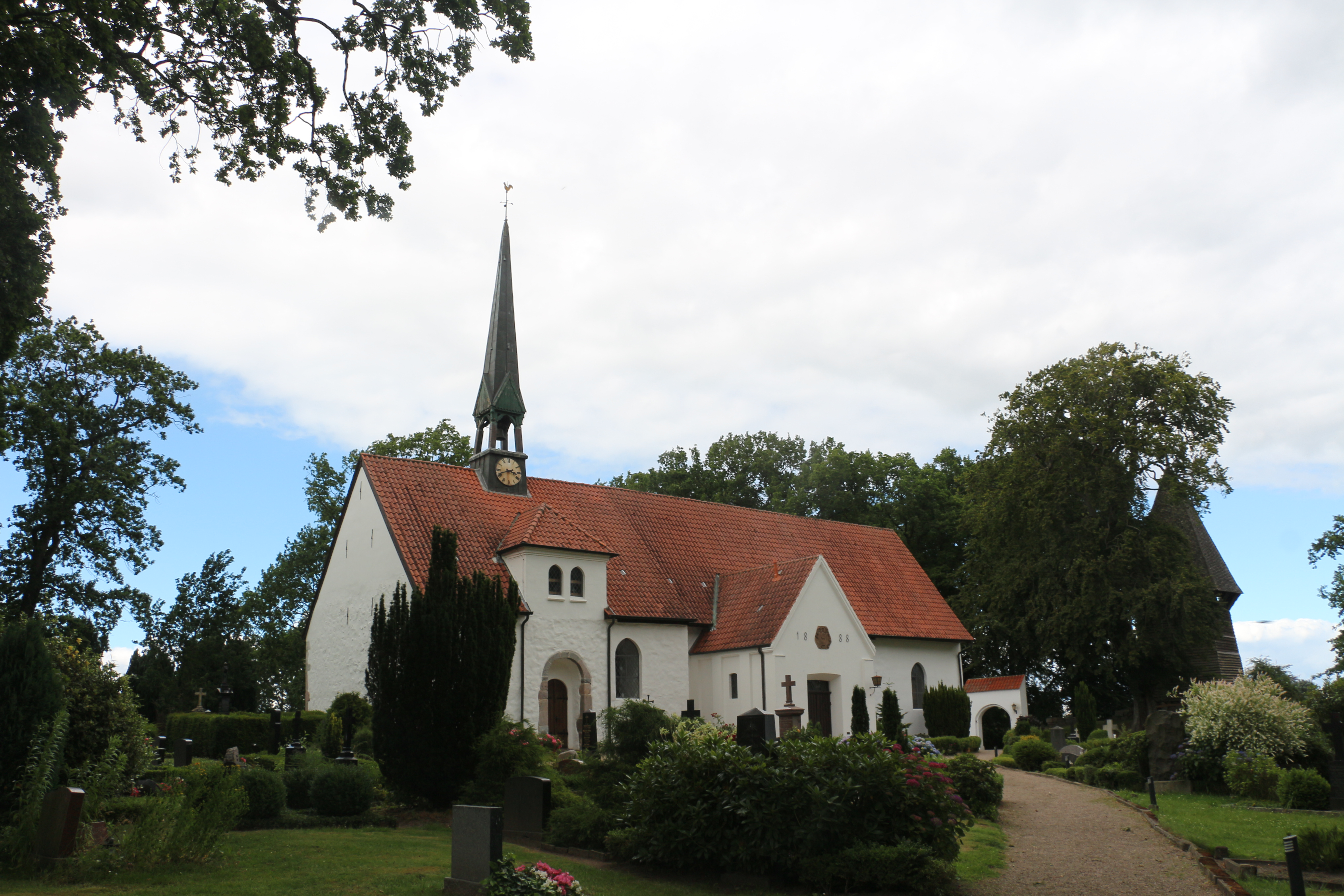 Wilhadikirche in Ulsnis von Südwesten mit dem östlichen Friedhofstor und dem Glockenturm